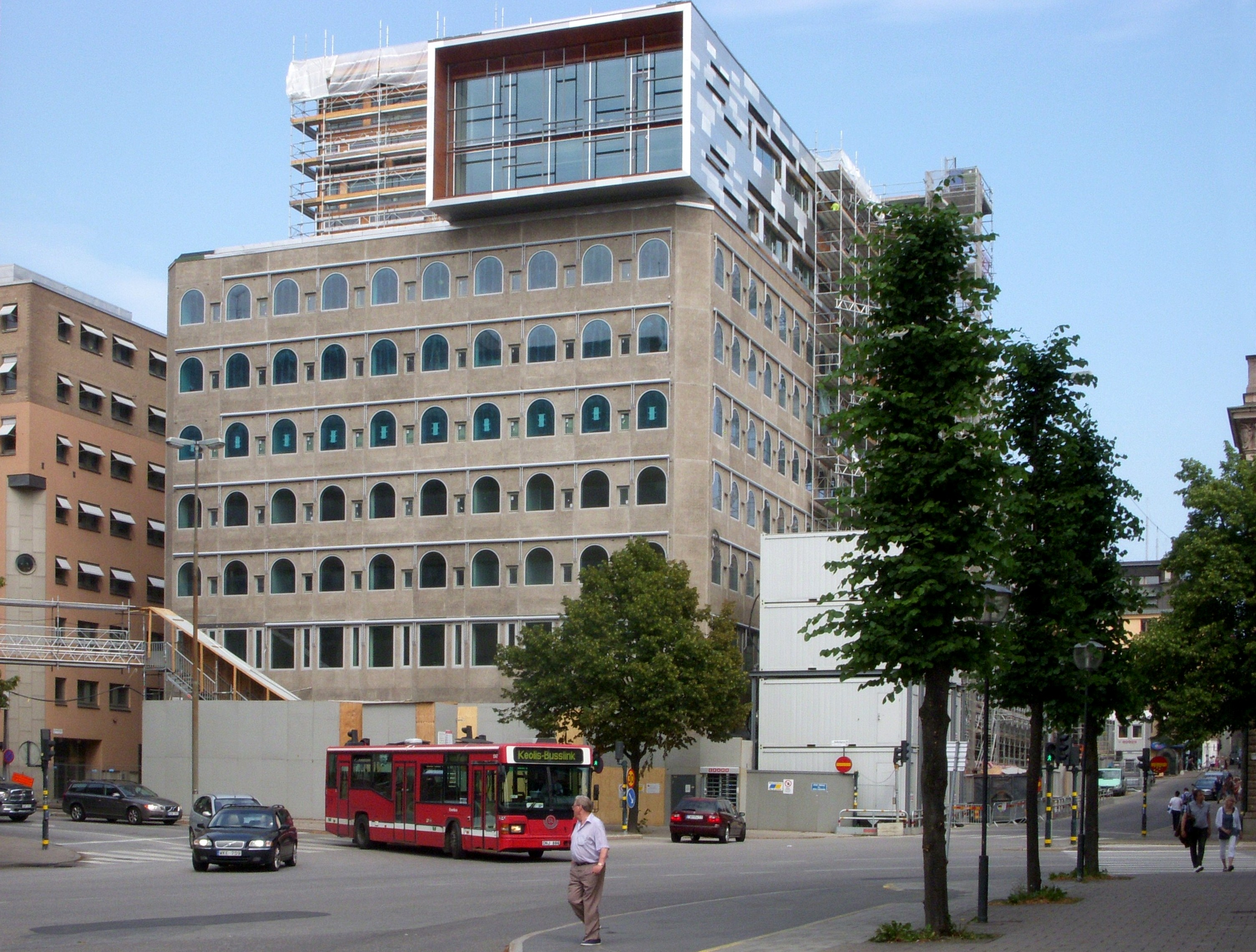 Näringsdepartementets hus i Stockholm under ombyggnad, Reflex Arkitekter